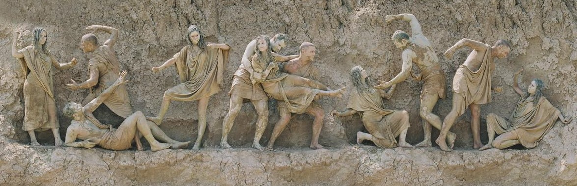 «Амазономахия», проект «Анимация Фидия». 2004 г.